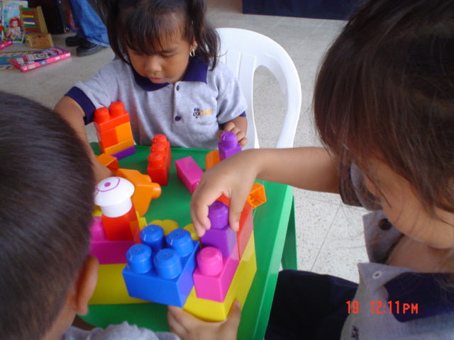 Programa ZUMAR - Rincón de juegos en la Biblioteca Lugar: Bastión Popular Ciudad: Guayaquil - Ecuador Autor: Equipo de trabajo del Programa Fecha: 2002 - 2006